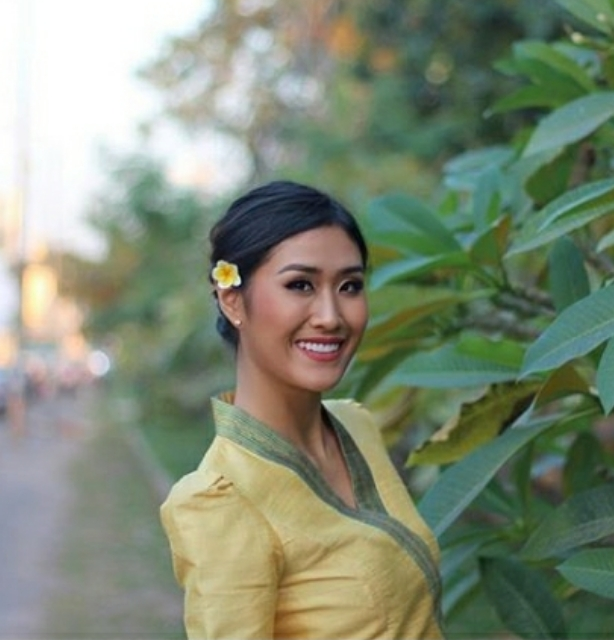 ລາວ: ອອນອານົງ ຫອມສົມບັດ